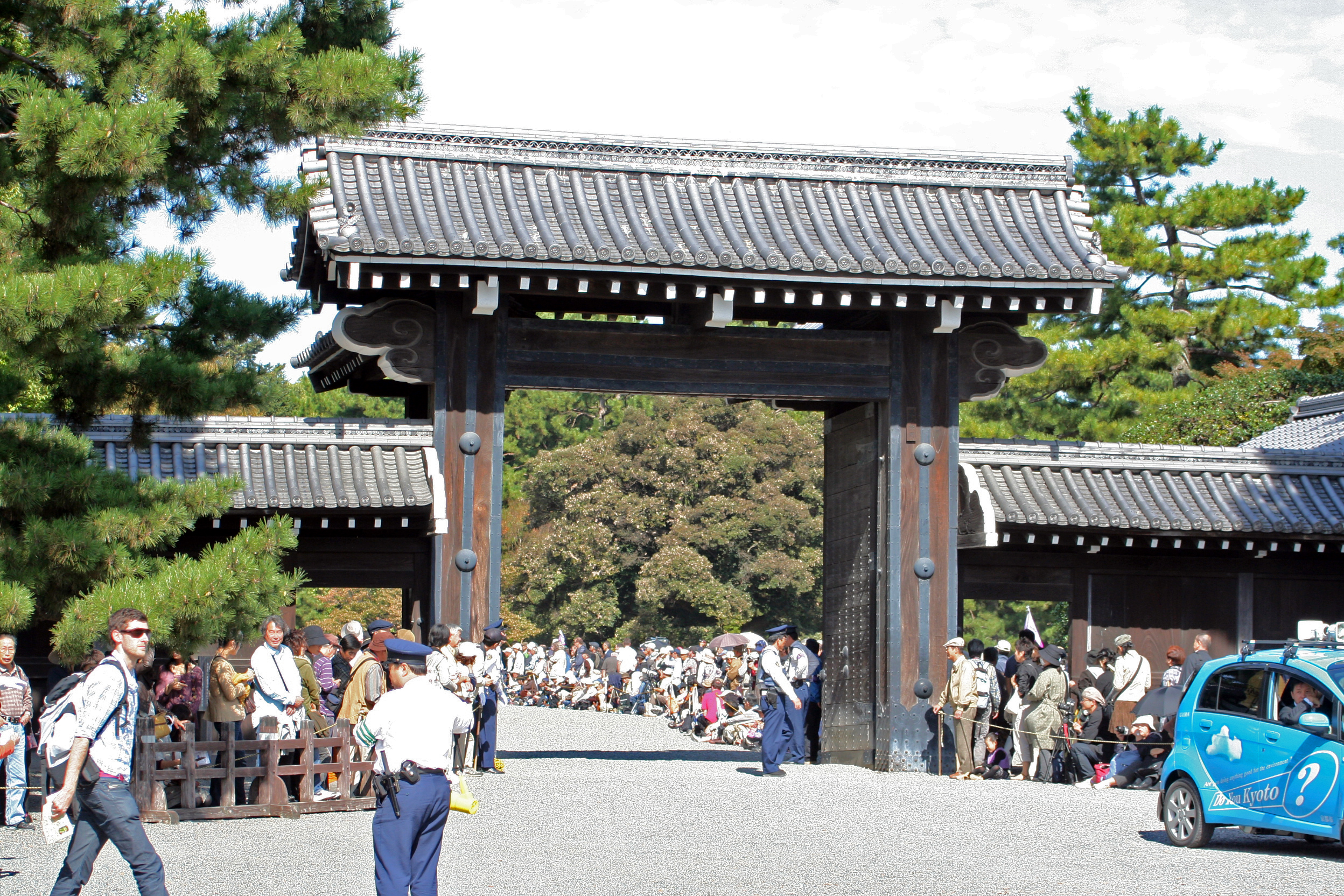 京都府京都市にて開催された時代祭。正午の御所から平安神宮までの行進の様子。2009年10月22日撮影。 京都御苑南にある堺町御門。